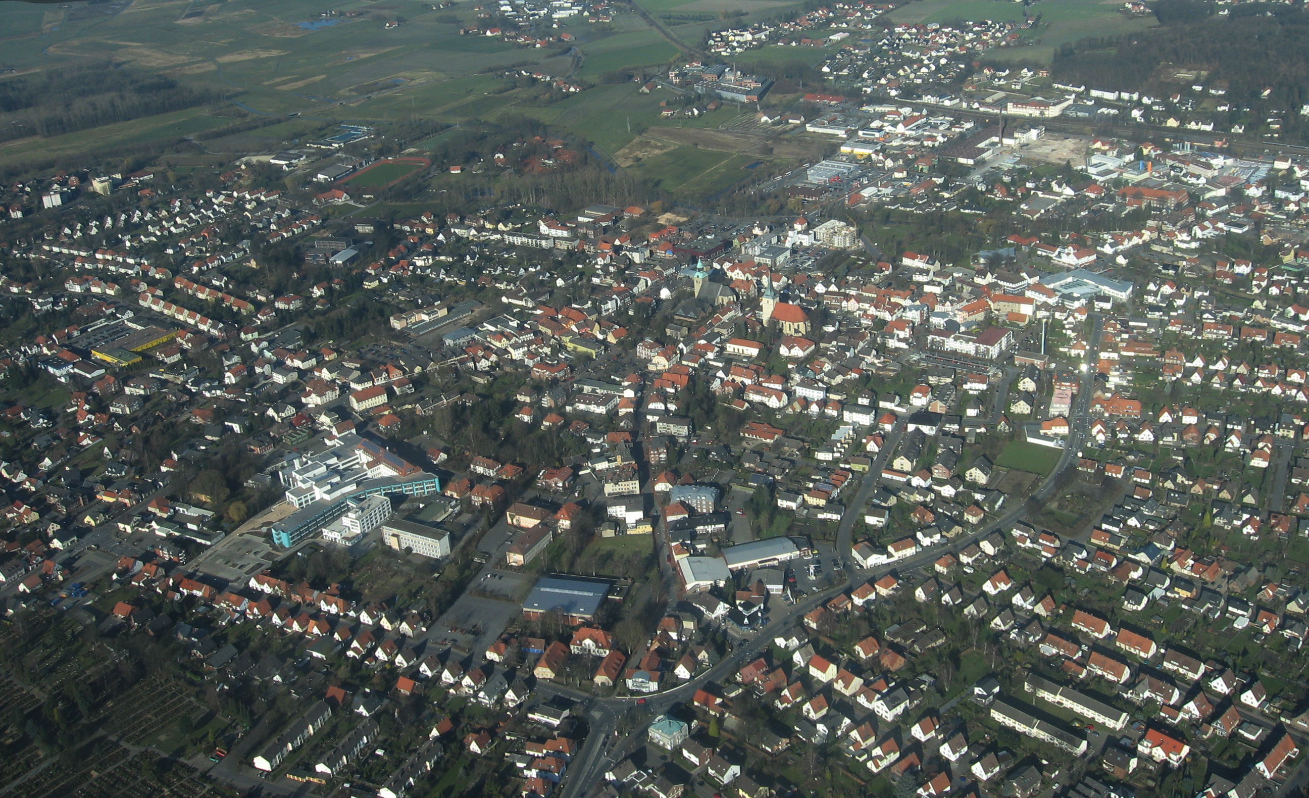 Luftaufnahme von Melle-Mitte